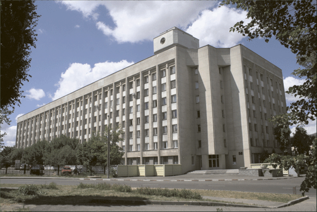 Здание Института пограничной службы Республики Беларусь в Минске.